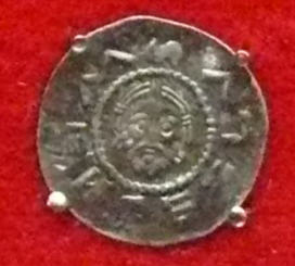 denár Vratislava II.